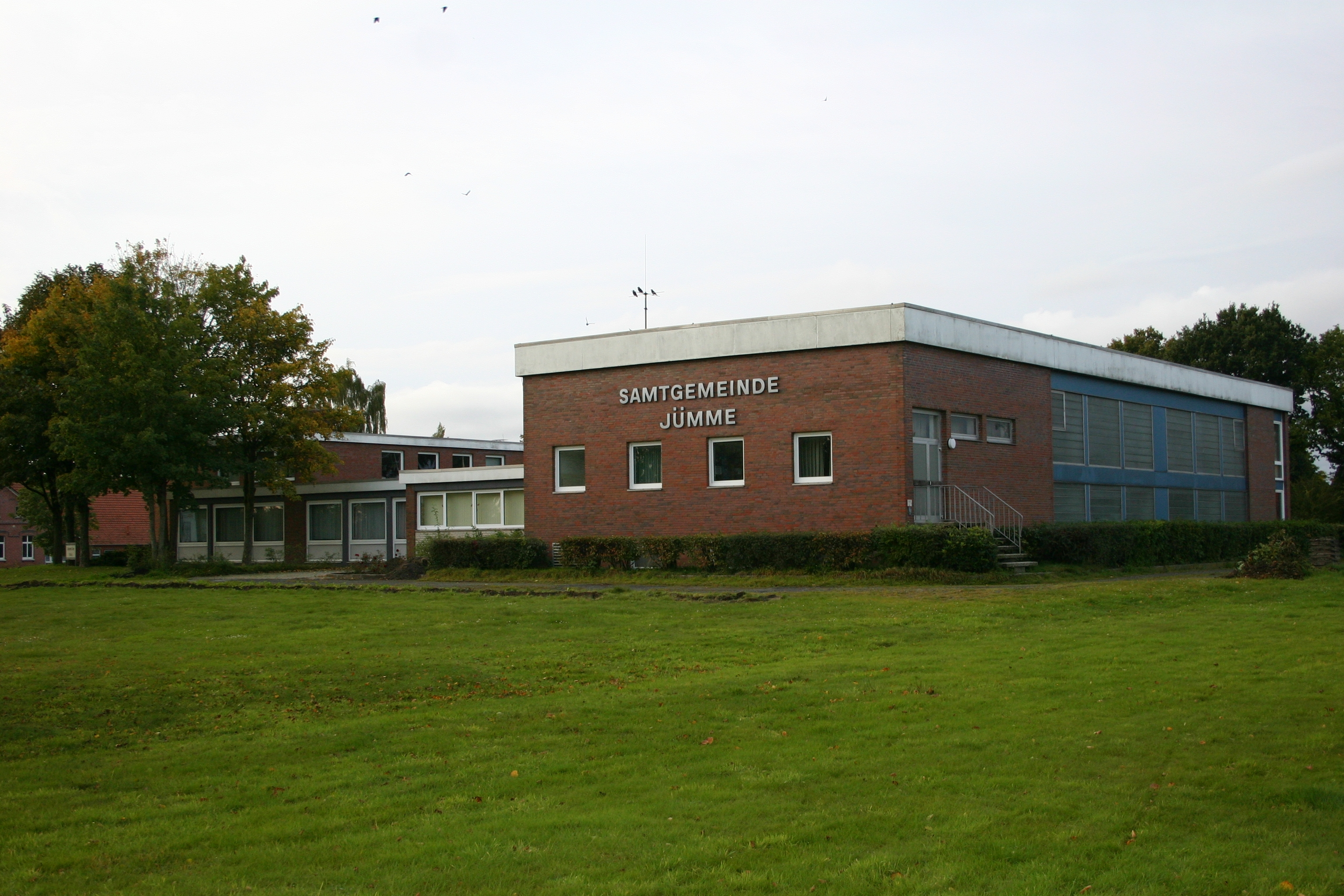 Rathaus der Samtgemeinde Jümme in Filsum